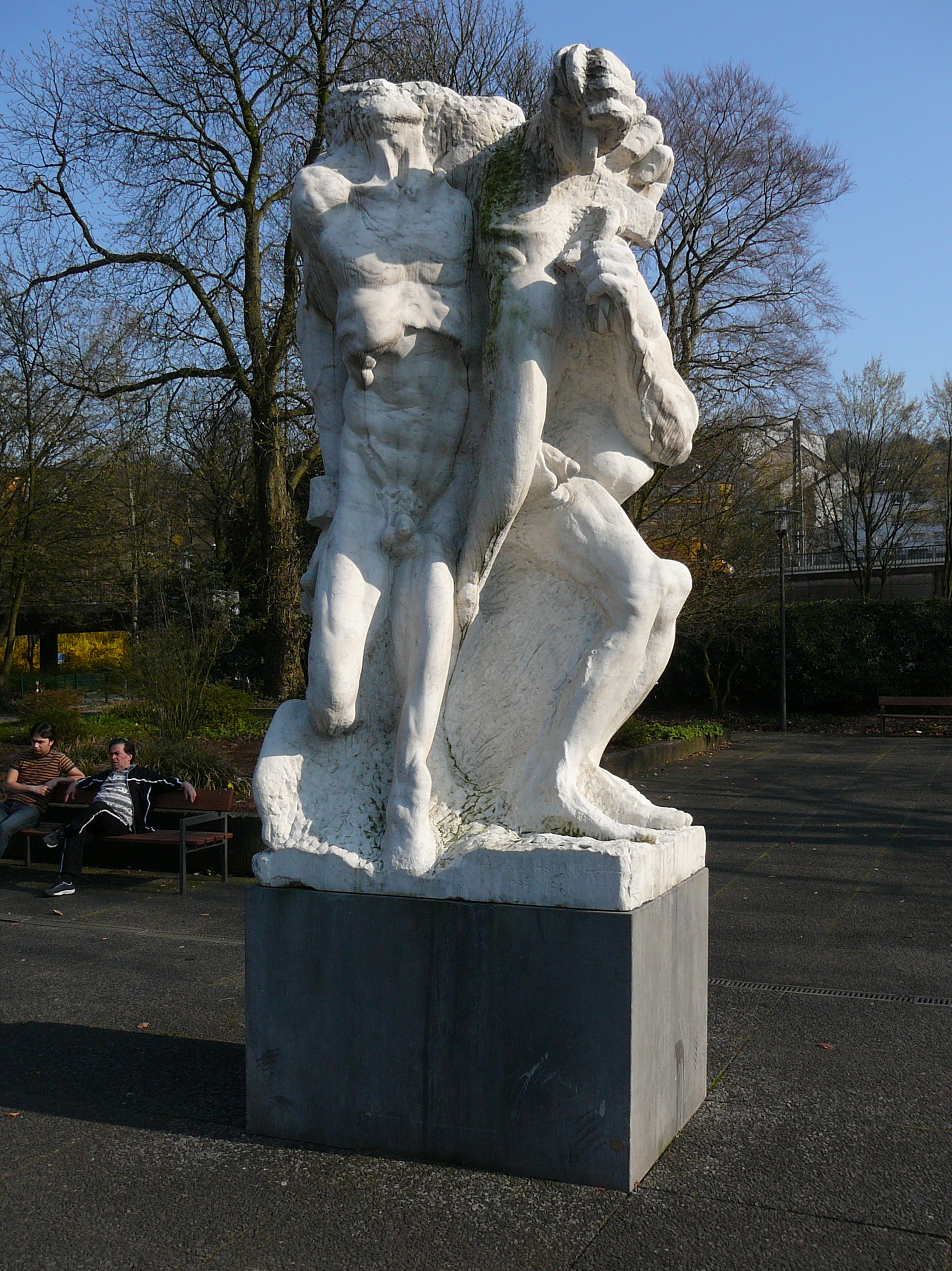 Engelsstraße, Wuppertal